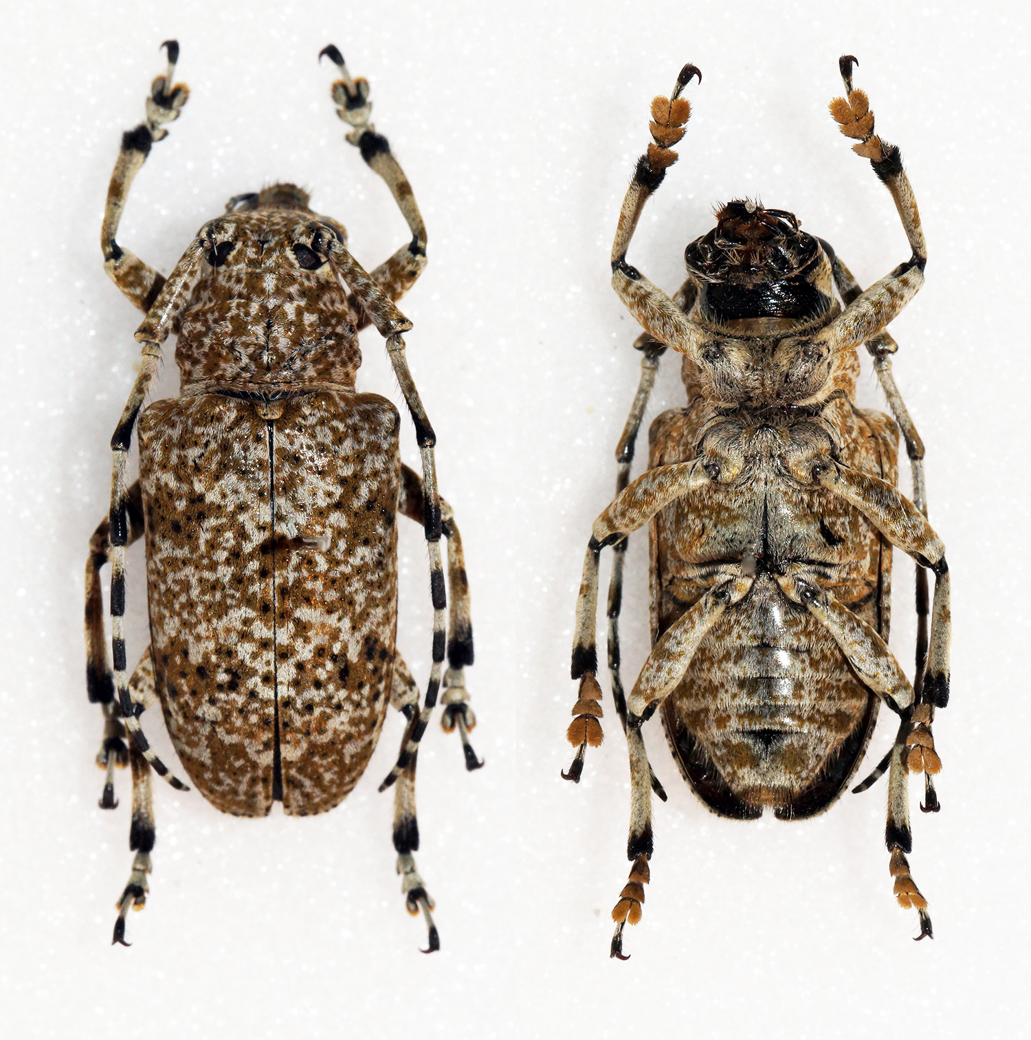 White,1858 Sex: Female Data: 10-06-14 - Mt.Ailaoshan - 2300m - Xinping - Yunnan - China Size: 19mm